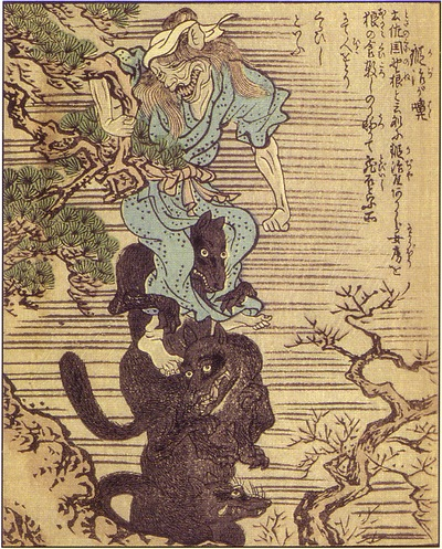 Kajiga-baba (鍛冶が嬶) from the Ehon Hyaku monogatari (絵本百物語)